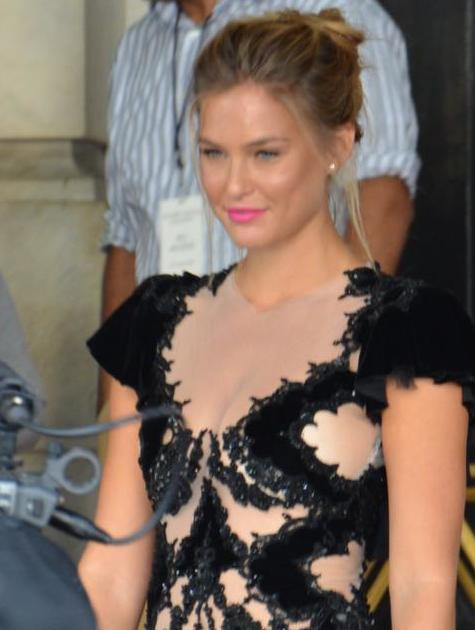 Bar Refaeli